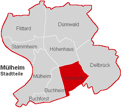 Lagekarte Holweide im Stadtbezirk Köln-Mülheim